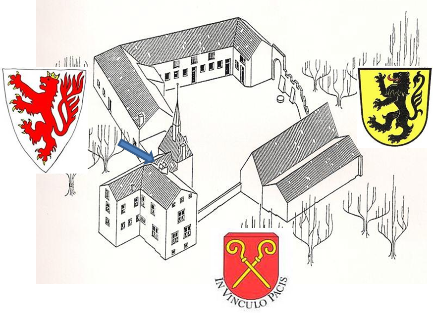 Auf dem Ostflügel der Schornstein (Pfeil), der über viele Jahrhunderte als Grenzmarke zwischen den Territorien Limburg, Jülich und Kornelimünster diente. Die Wappen symbolisieren die Territorien: Im WSW Limburg - roter gekrönter Löwe mit Doppelschweif auf silbernem Grund, im NNO Jülich - schwarzer Löwe auf goldenem Grund, im OSO Kornelimünster - zwei gekreuzte Krummstäbe auf rotem Grund, Umschrift in vinculo pacis (in der Fessel des Friedens ≙ in der Verantwortung zum Frieden).